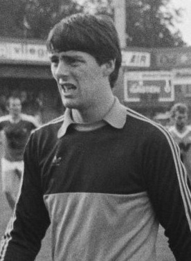 Hans de Koning